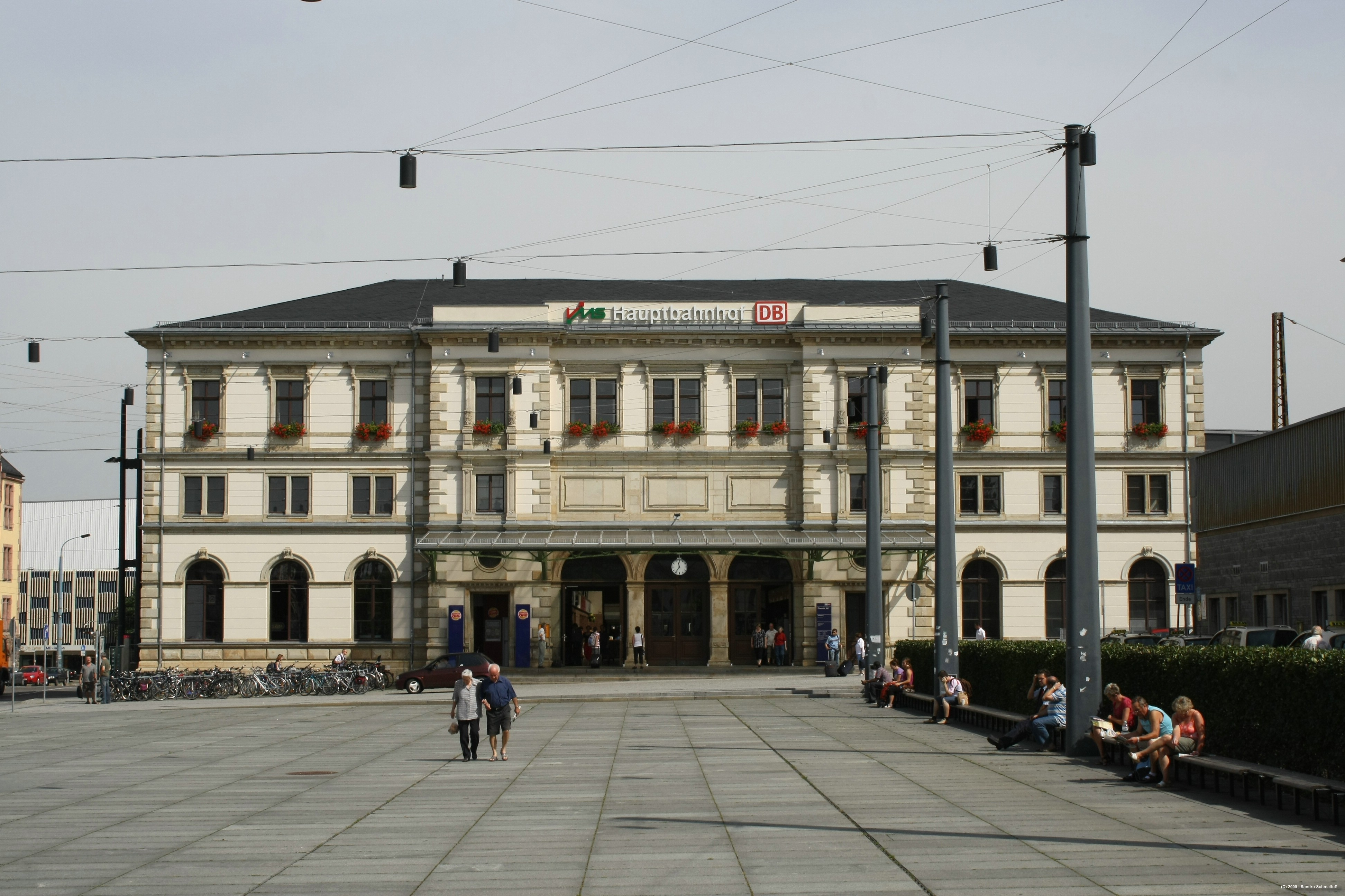 Chemnitz Hauptbahnhof August 2009. Anmerkungen:Bei Interesse an Lizenzen für höhere Auflösungen bitte den Urheber über die angegebene Website kontaktieren.